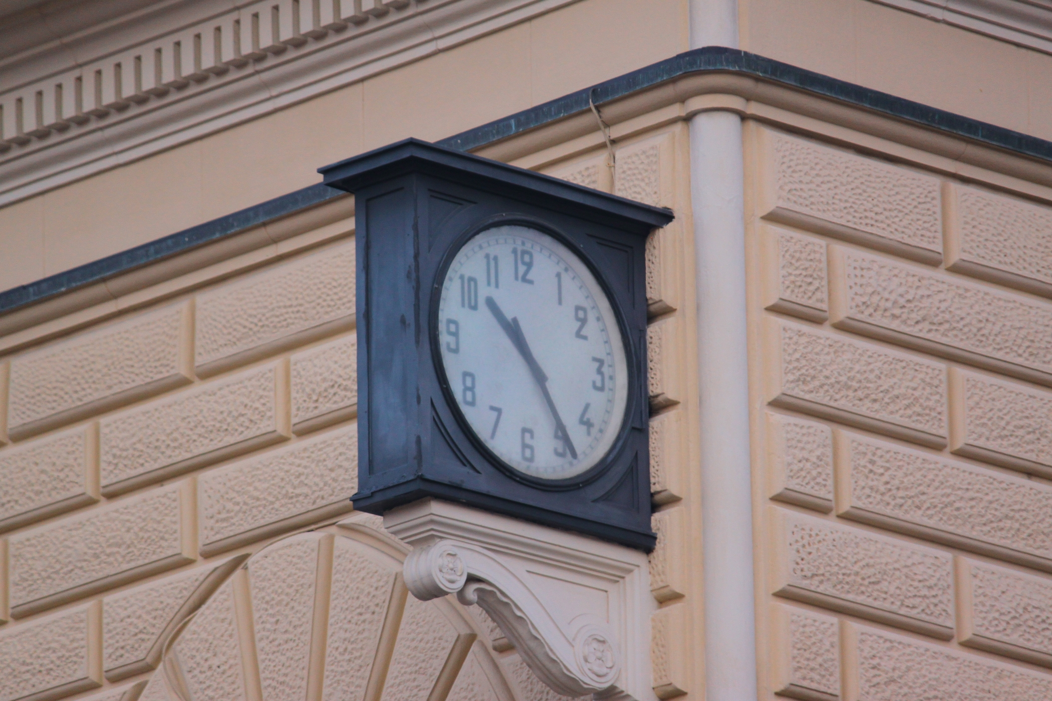 Orologio della stazione di Bologna fermo alle 10:25 ora della strage del 02/08/1980